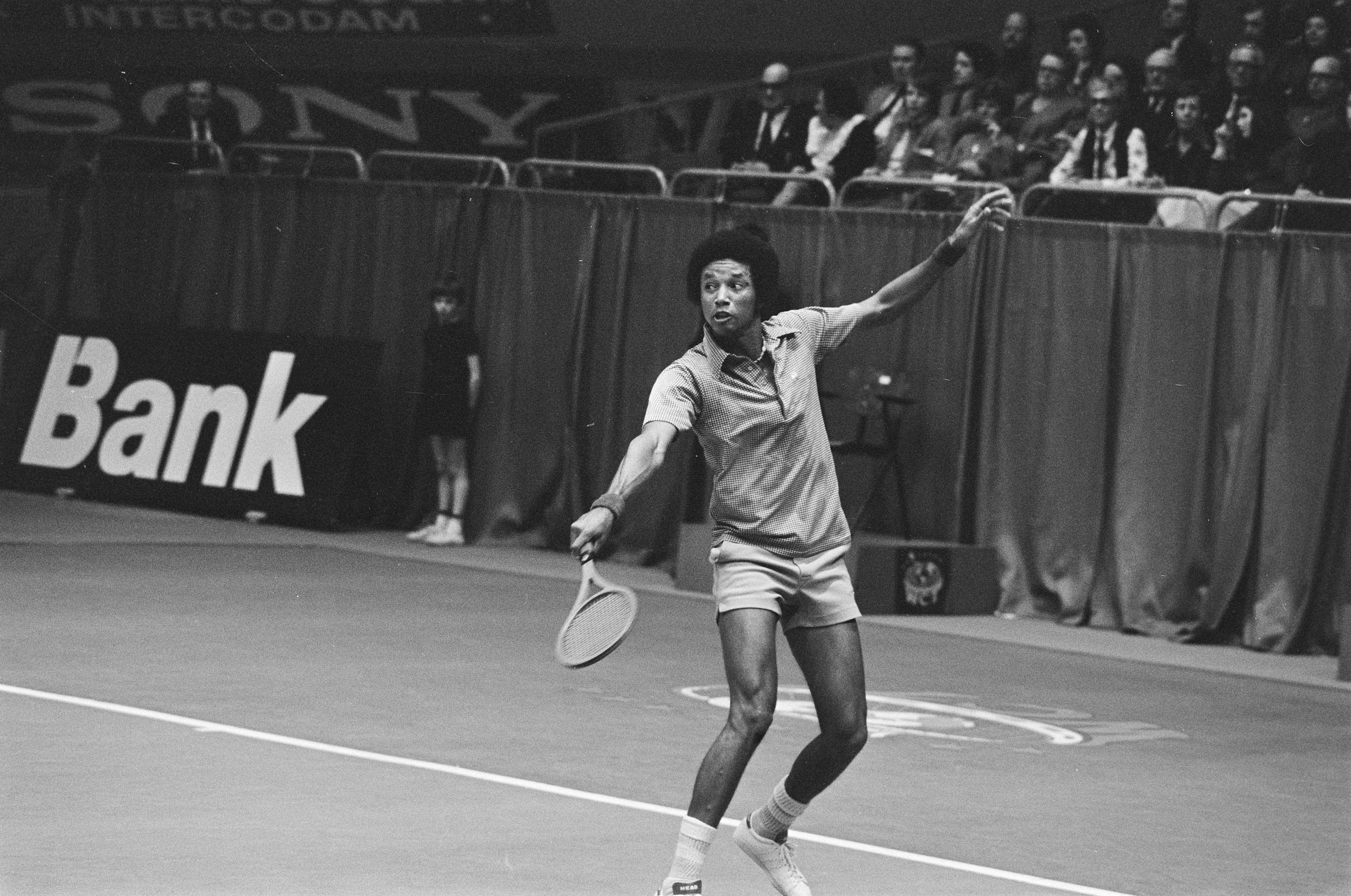 Collectie / Archief : Fotocollectie Anefo Reportage / Serie : [ onbekend ] Beschrijving : ABN-wereldtennistoernooi in Rotterdam; Arthur Ashe in actie Datum : 1 maart 1975 Locatie : Rotterdam, Zuid-Holland Trefwoorden : tennis, tournooien Instellingsnaam : ABN Fotograaf : Bogaerts, Rob / Anefo Auteursrechthebbende : Nationaal Archief Materiaalsoort : Negatief (zwart/wit) Nummer archiefinventaris : bekijk toegang 2.24.01.05 Bestanddeelnummer : 927-7839